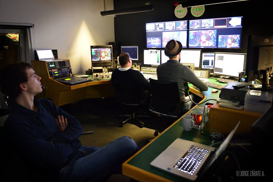 Regiearbeit während der Sendung NRW live.